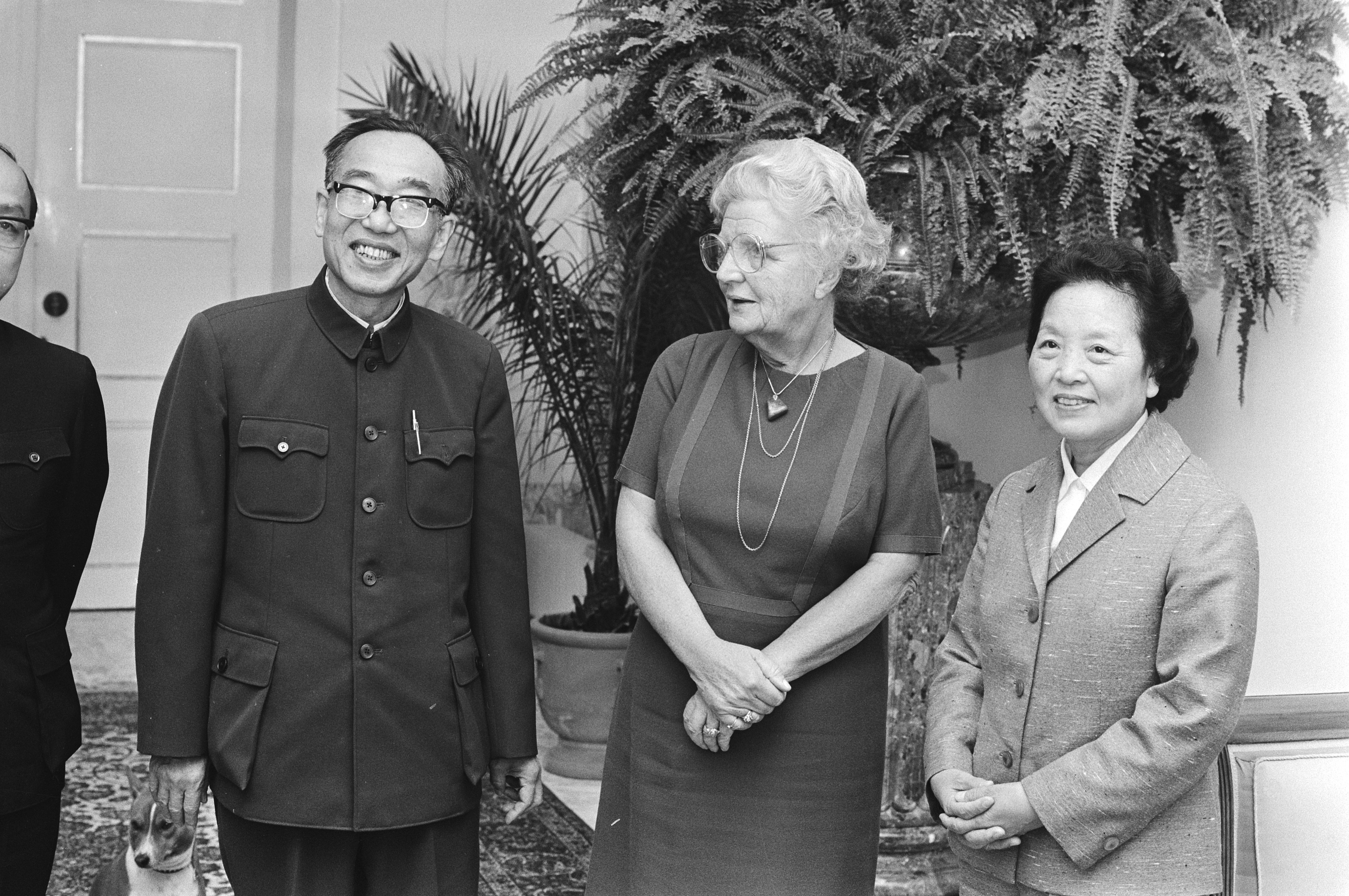 Collectie / Archief : Fotocollectie Anefo Reportage / Serie : Ontvangst op paleis Soestdijk door koningin Juliana van de vice premier van de Staatsraad van China, Wang Renzhong Beschrijving : V.l.n.r. vice premier Renzhong, koningin Juliana en ambasadrice Ding Xuerong Datum : 5 oktober 1979 Locatie : Baarn, Utrecht (prov) Trefwoorden : ambassadeurs, koninginnen, ontvangsten, politici Persoonsnaam : Ding Xuerong, Juliana, koningin, Wang Renzhong Fotograaf : Croes, Rob C. / Anefo Auteursrechthebbende : Nationaal Archief Materiaalsoort : Negatief (zwart/wit) Nummer archiefinventaris : bekijk toegang 2.24.01.05 Bestanddeelnummer : 930-4757